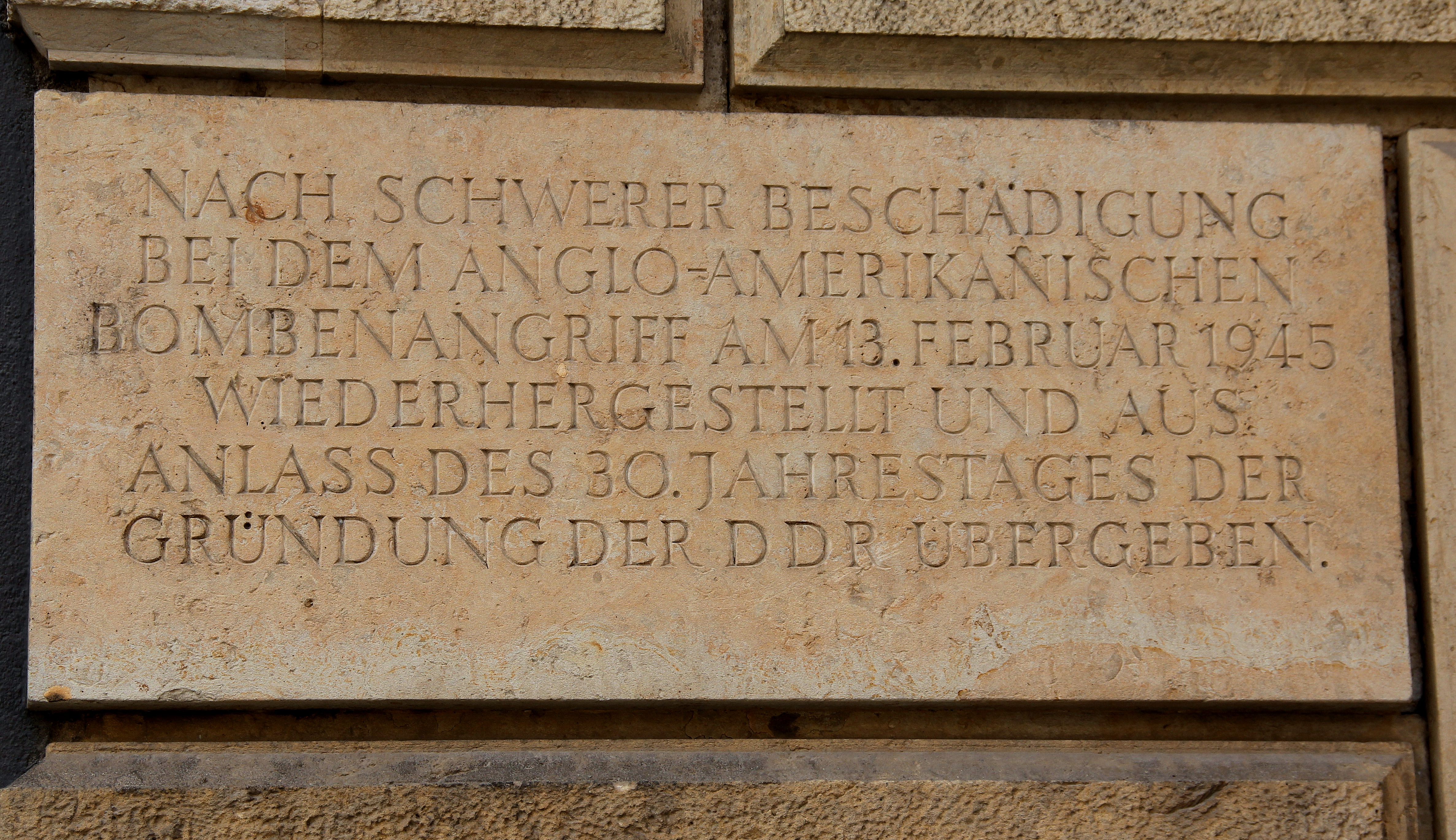 Gedenkstein am Fürstenzug zur Restaurierung im Jahre 1979